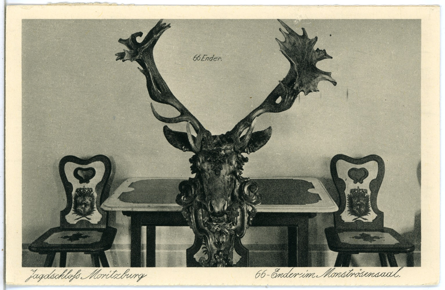 Moritzburg; 66 - Ender im Monströsensaal This postcard is from publisher Brück & Sohn in Meißen ( postcard has a unique number 22929 and is available in a higher resolution at the publisher. This images was uploaded in a cooperation project between Wikipedians and the publisher.